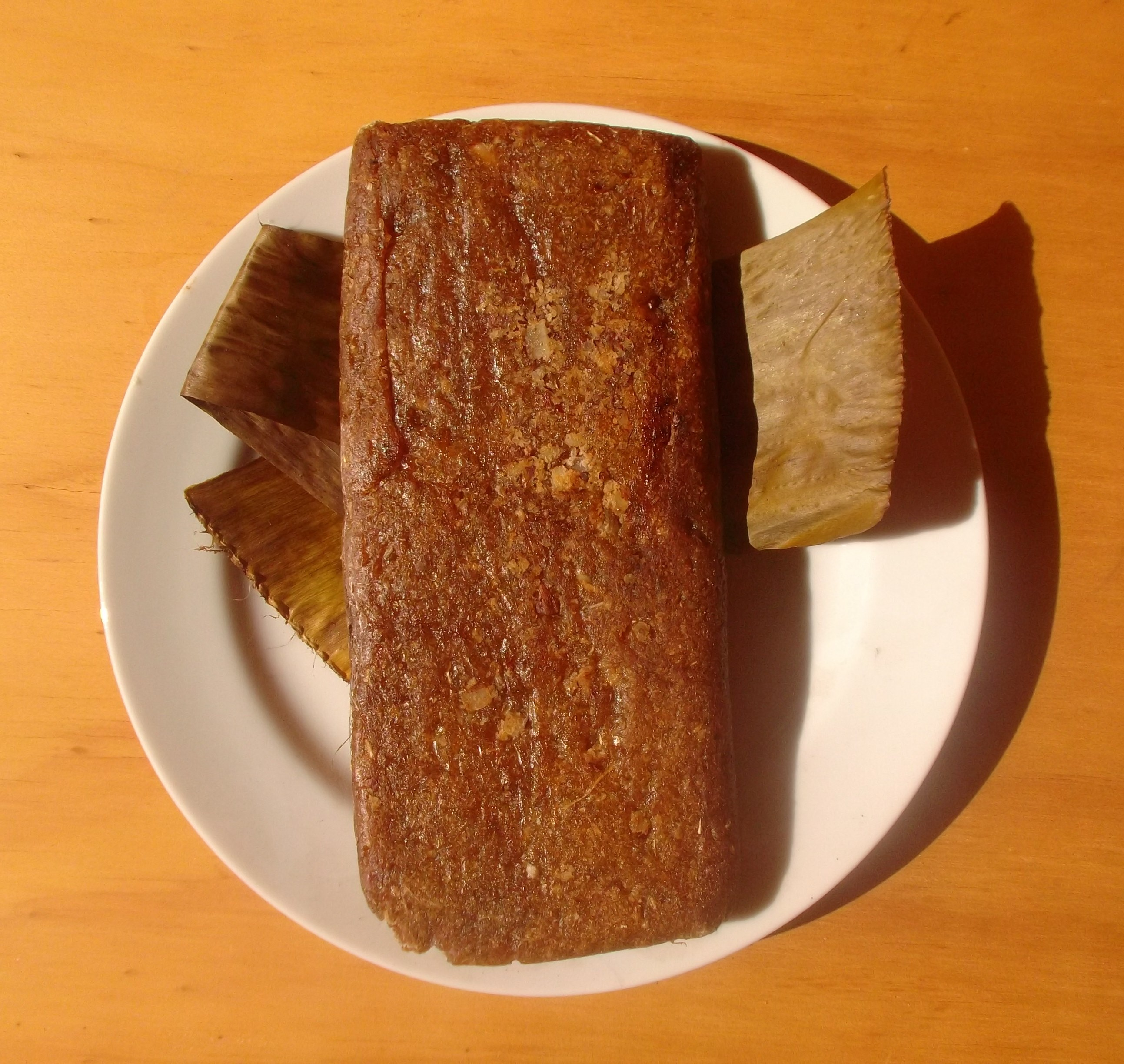 Bolo típico do nordeste, mas especificamente, em Tianguá, no Ceará. Feito a base de puba com coco babaçu.